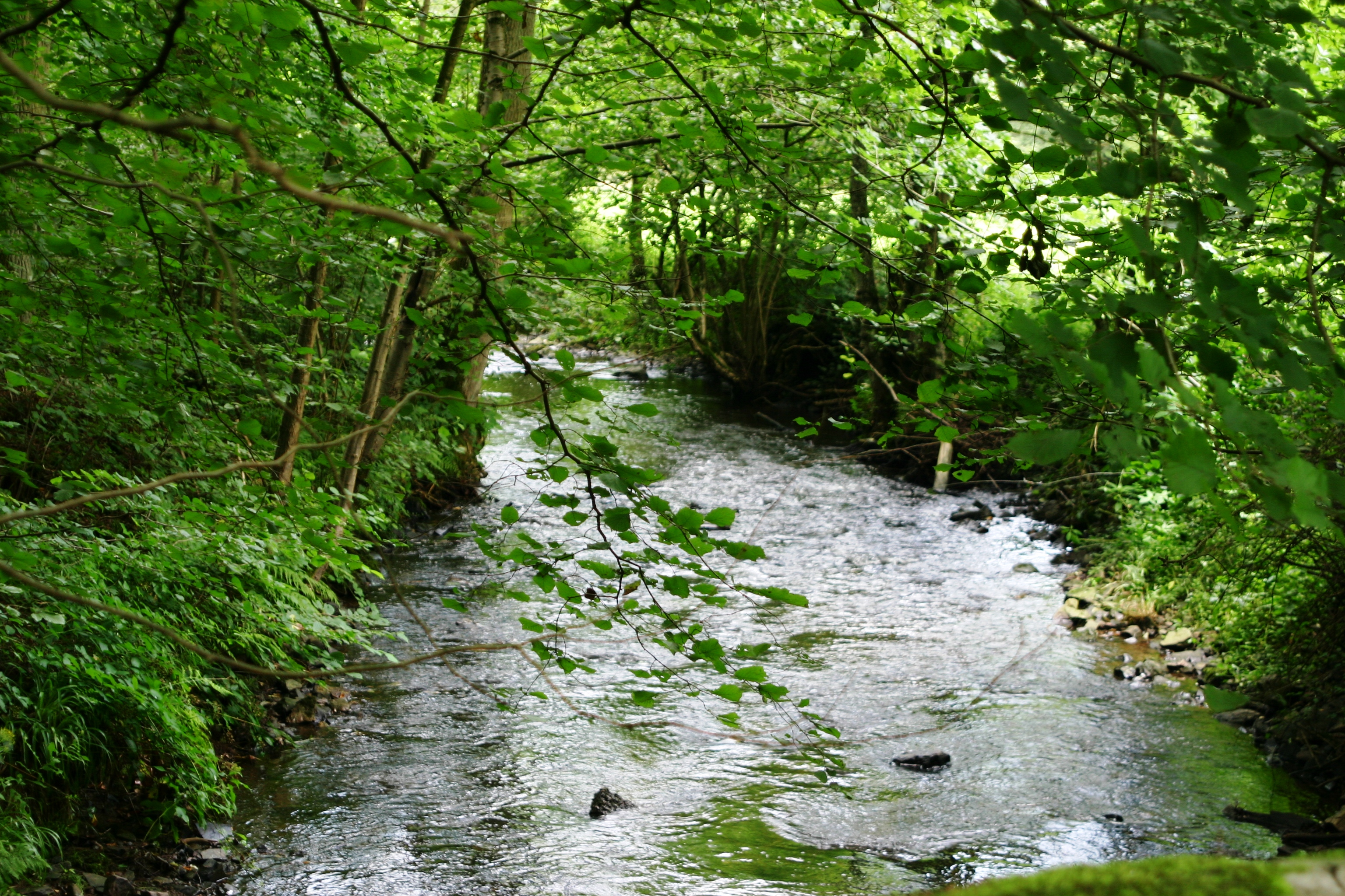 La Lembrée près du château de Grimonster (Belgique)